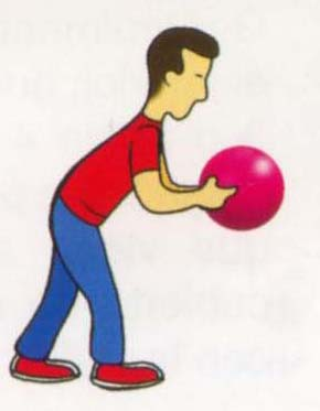 Primer paso.